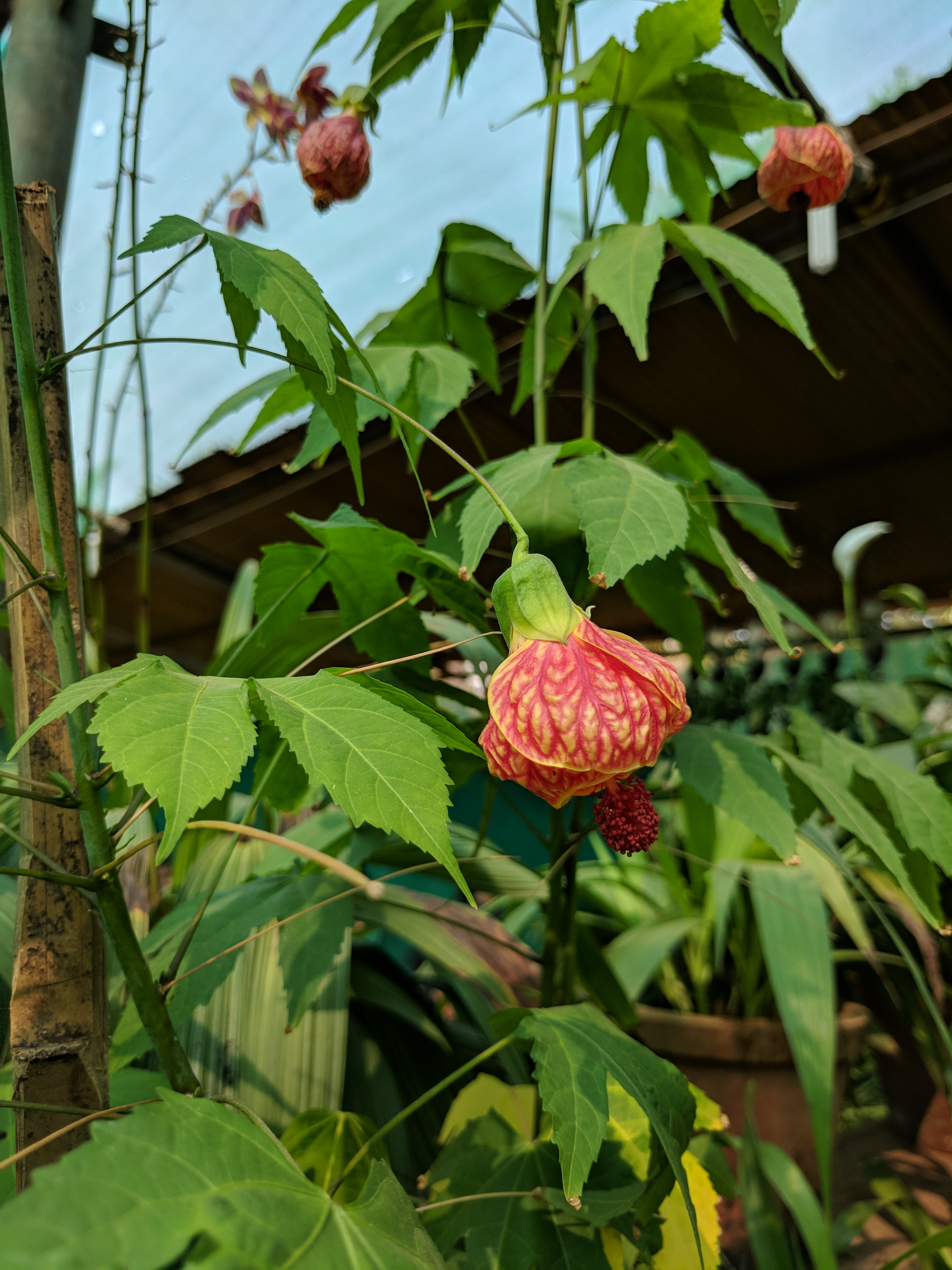 Kakkayam